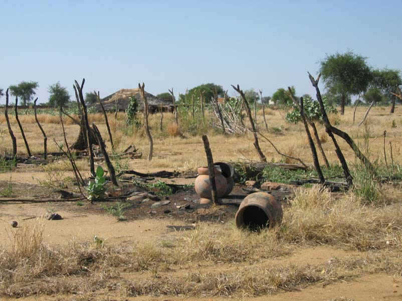 Op de foto zie je een vernietigd dorp in Darfur.